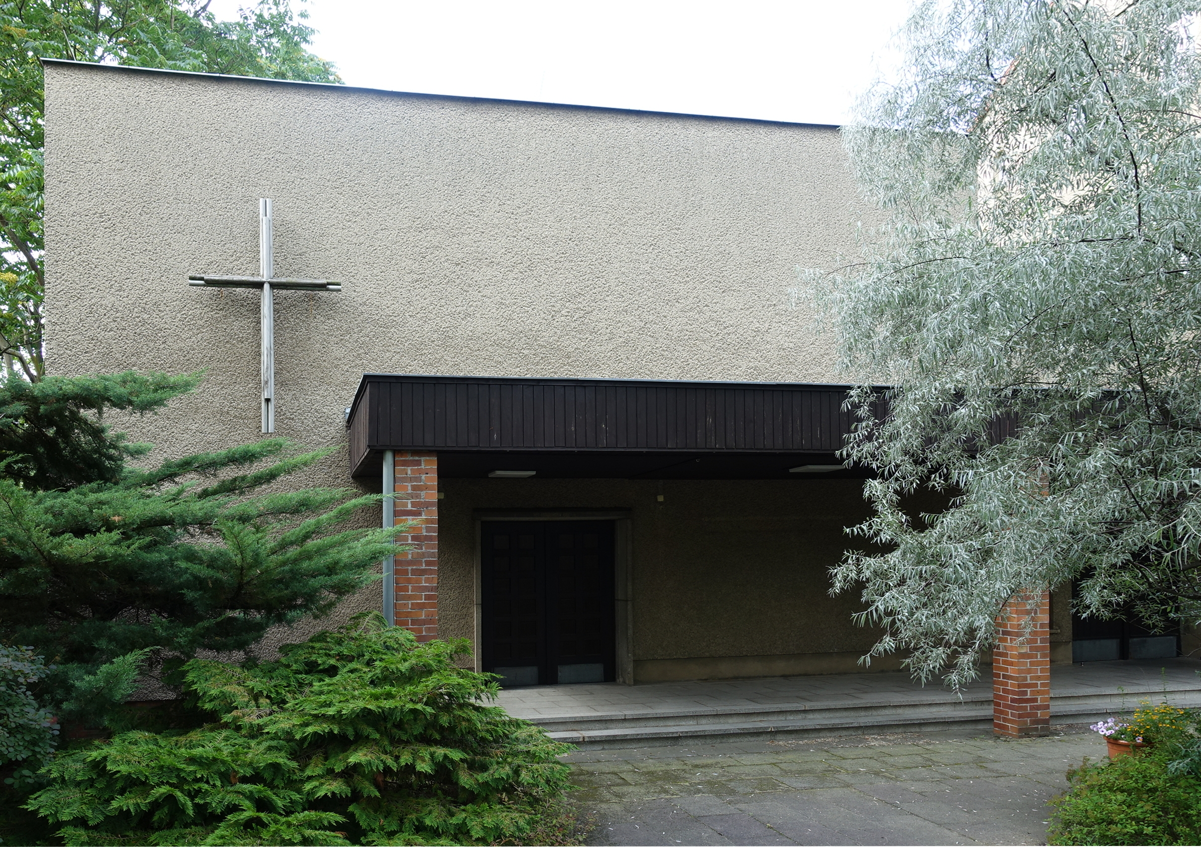 Portal von St. Johannes